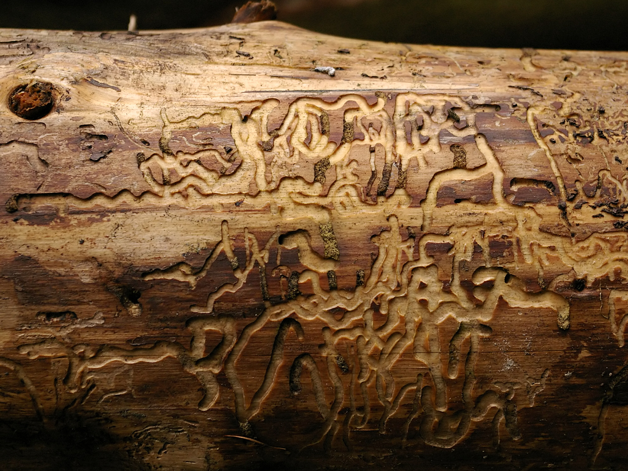 Fraßgänge, vermutlich von einem Borkenkäfer